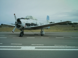 3-A-333 (1-A-262) antes de su restauración.